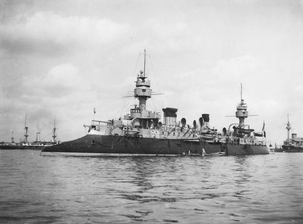 vor Holtenau zur Eröffnung des Kaiser-Wilhelm-Kanals.